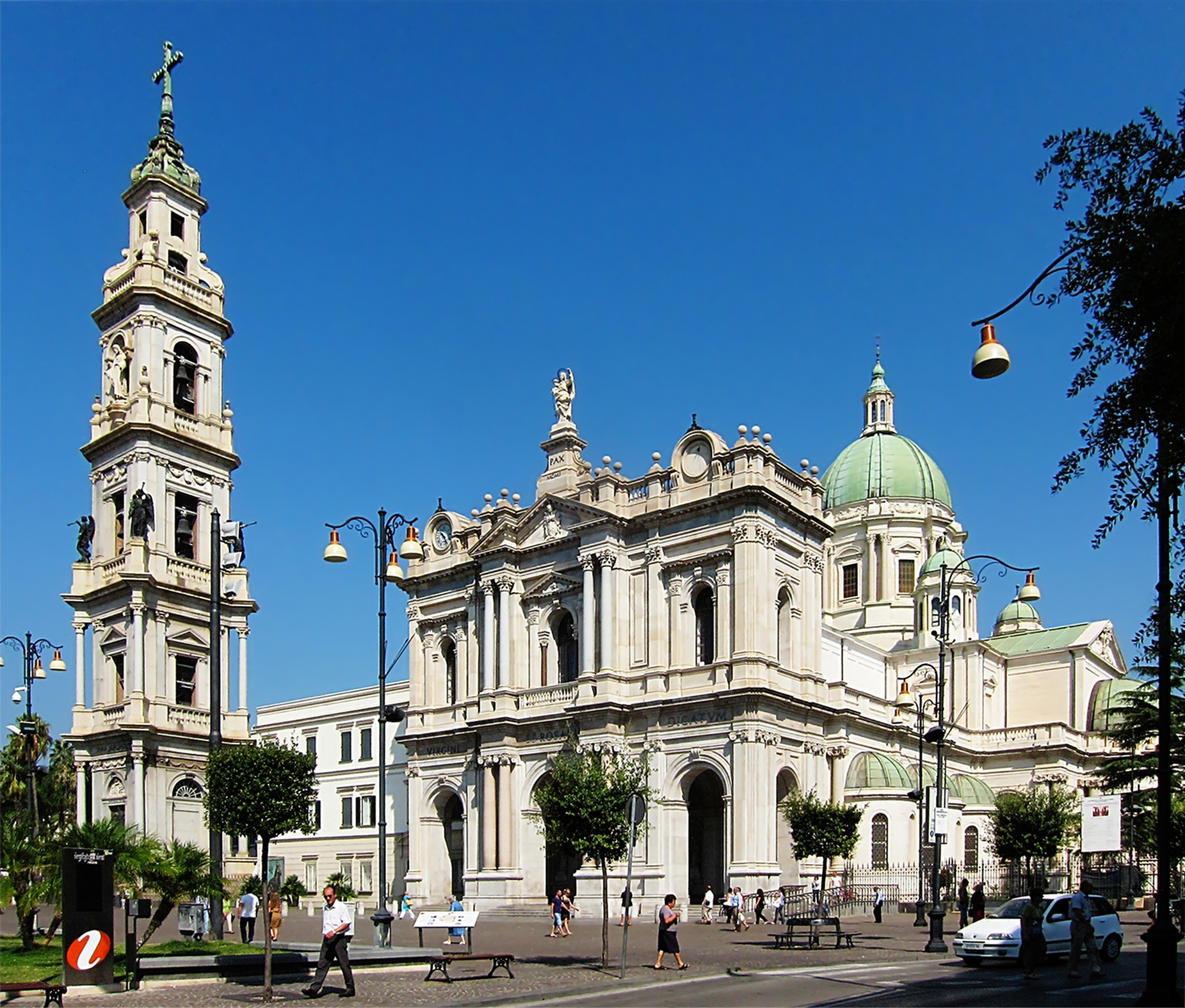 Le Santuario della Beata Vergine del Rosario de Pompei (Italie).